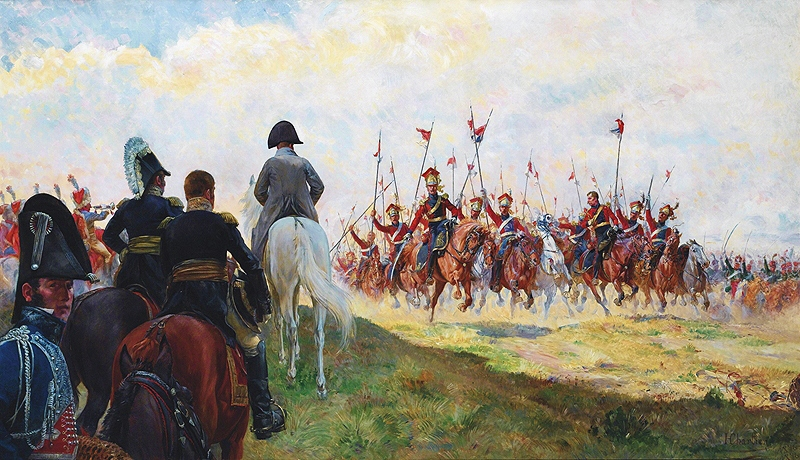 « Après la charge : Hanau, 1813 ». Les lanciers rouges de la Garde impériale acclament Napoléon de retour de leur charge contre les Bavarois. Au fond, les gardes d'honneur.